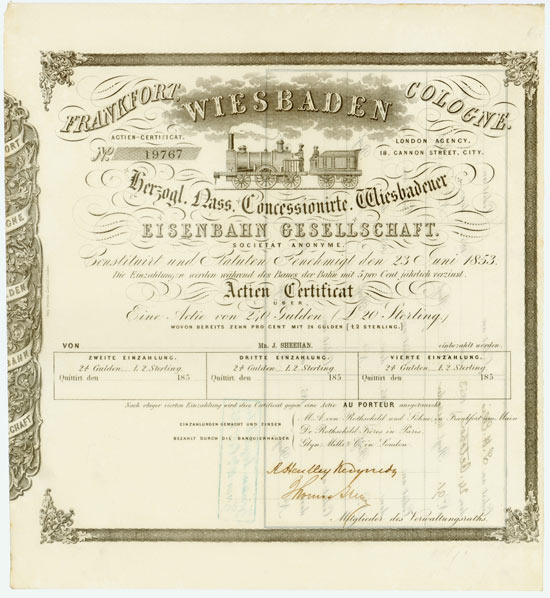 Aktie über 240 Gulden der Wiesbadener Eisenbahn Gesellschaft S.A. vom 23. Juni 1853